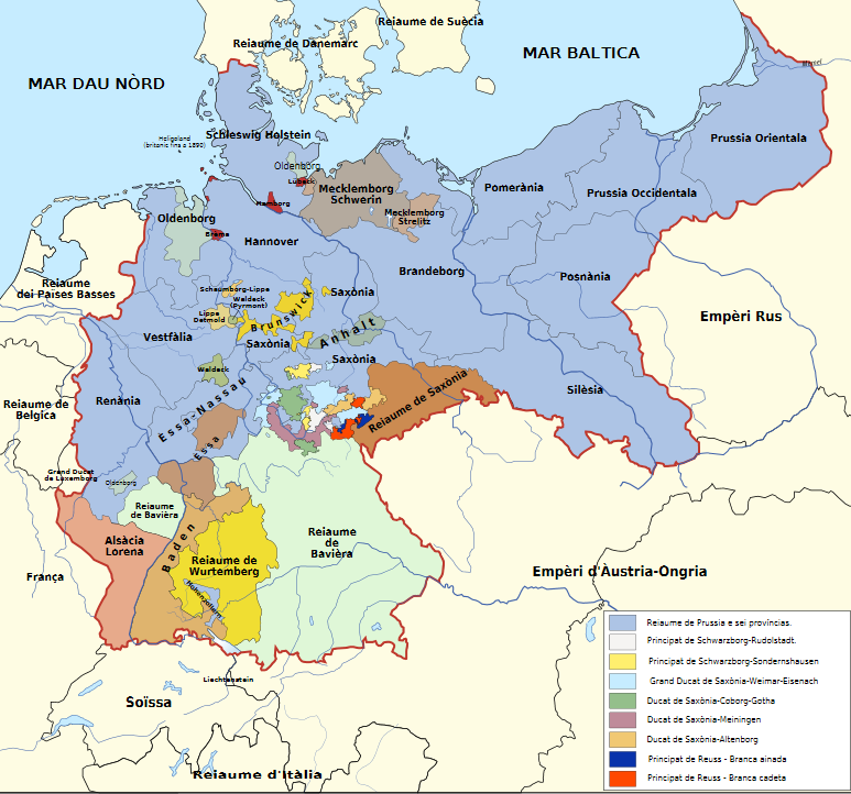 Empèri alemand en 1871.